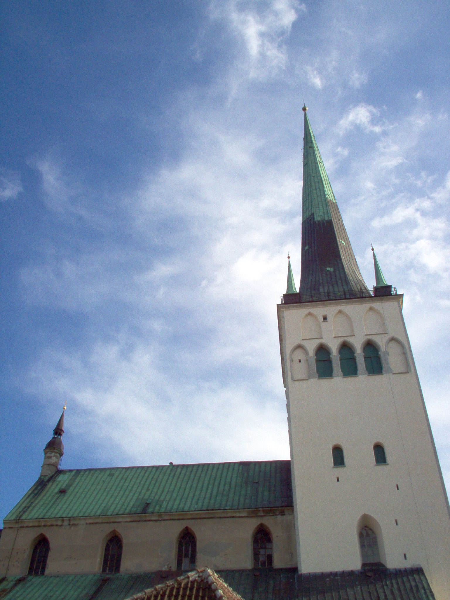 Oleviste kirik